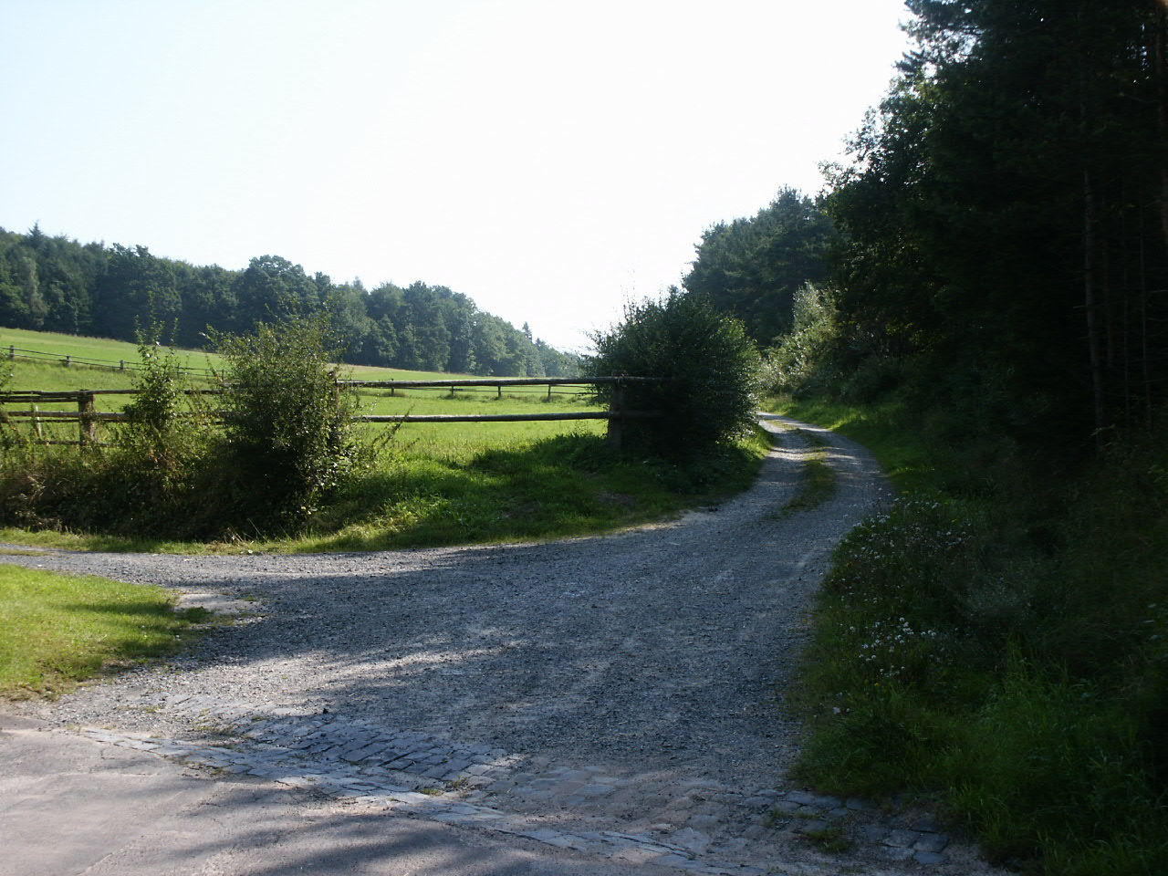 Wandern um Heenes